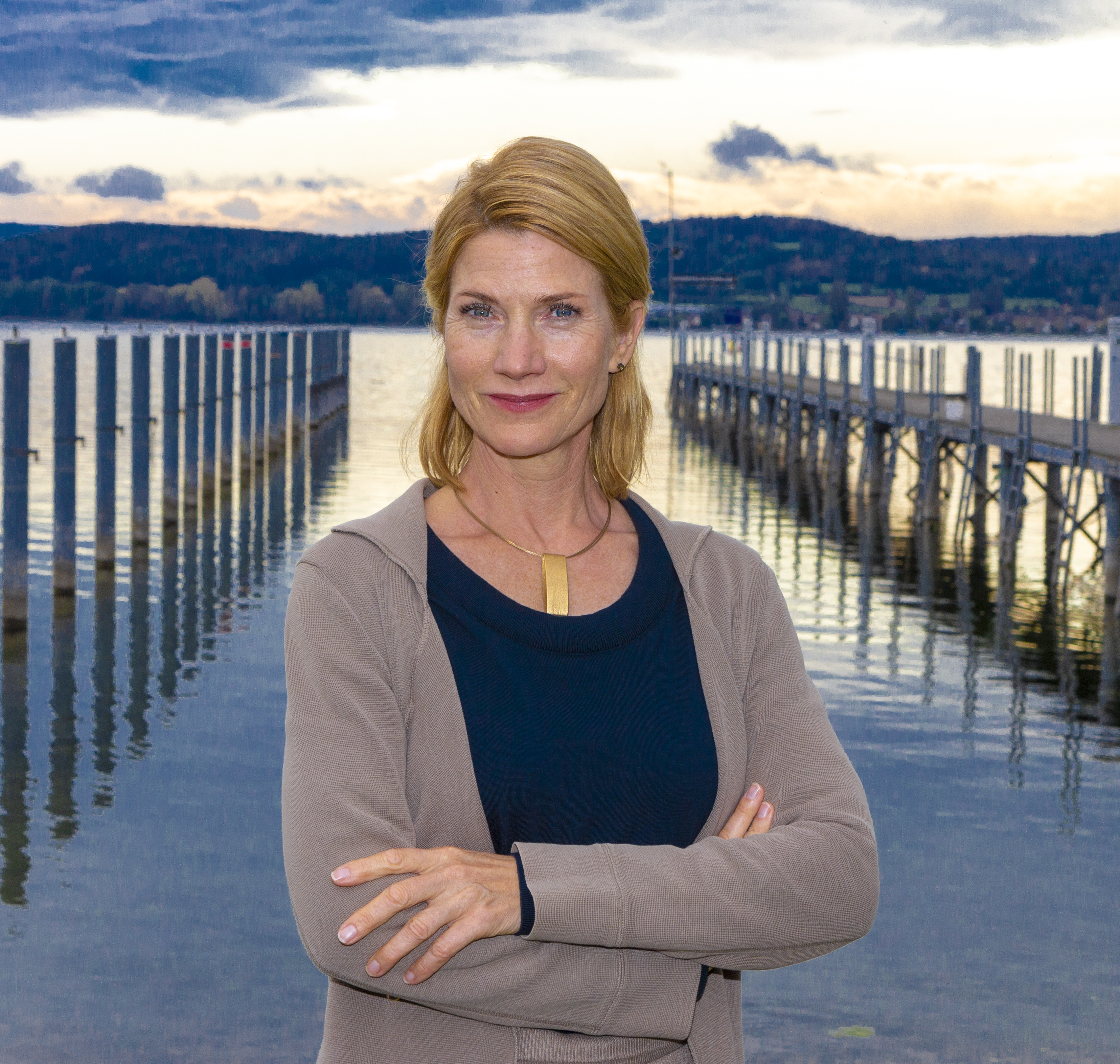 Astrid M. Fünderich am Set von WaPo Bodensee am 15. Oktober 2019 in Radolfzell am Bodensee.